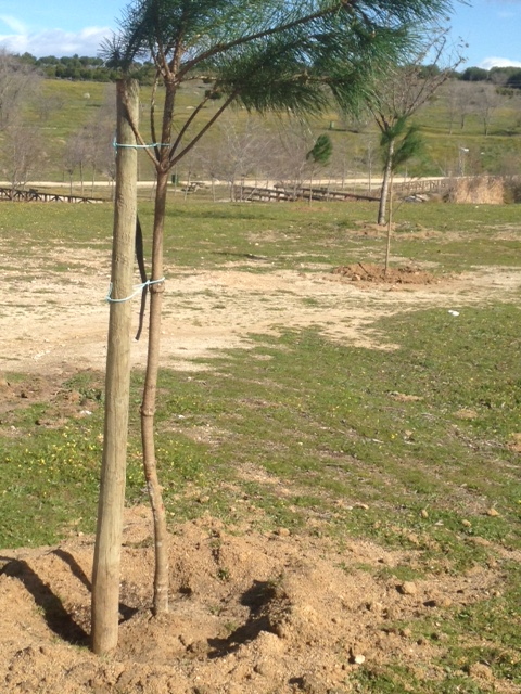 El ayuntamiento continua perpetuando las malas políticas de repoblación con coníferas alóctonas. (Foto del 07/02/2016)